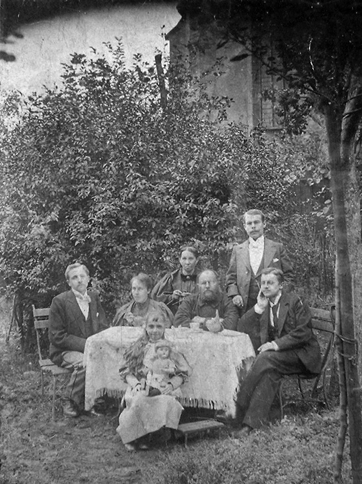 Familienfoto der Familie Peltz